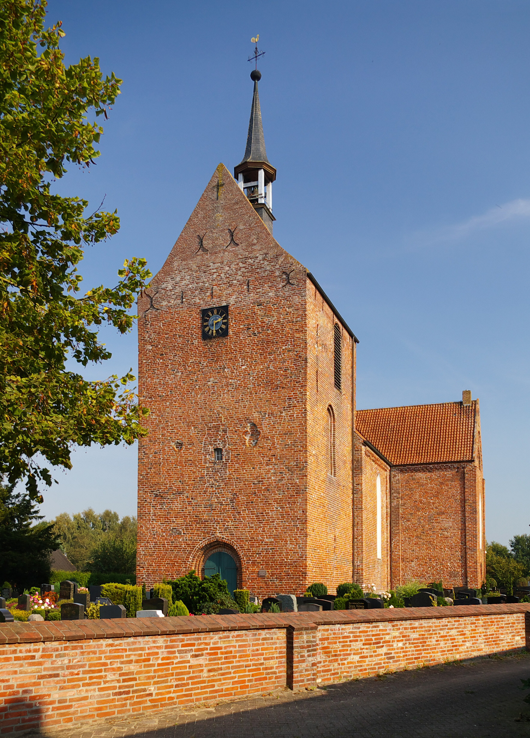 Kirche der ev.-reformierten Gemeinde in Stapelmoor, Emsland